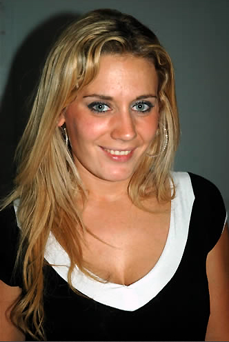 Rocío Marengo, modelo y bailarina argentina. Fotografía tomada en camarines de la discotheque "El Cuervo" en Coyhaique, Chile. 21 de octubre de 2006.